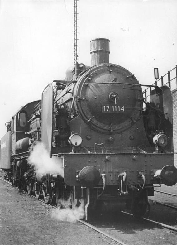 Dampflok 17 1114 (BR 17) Zentralbild Sturm 6.5.52 Lokomotive